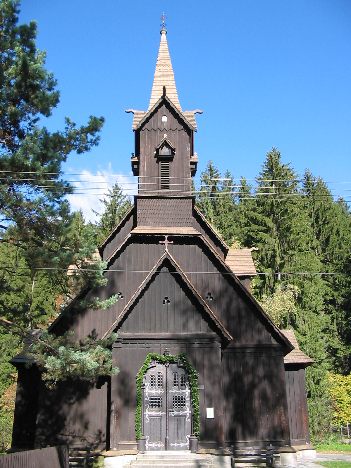 Farní římskokatolický kostel Sv. Bedřicha v beskydské obci Bílá